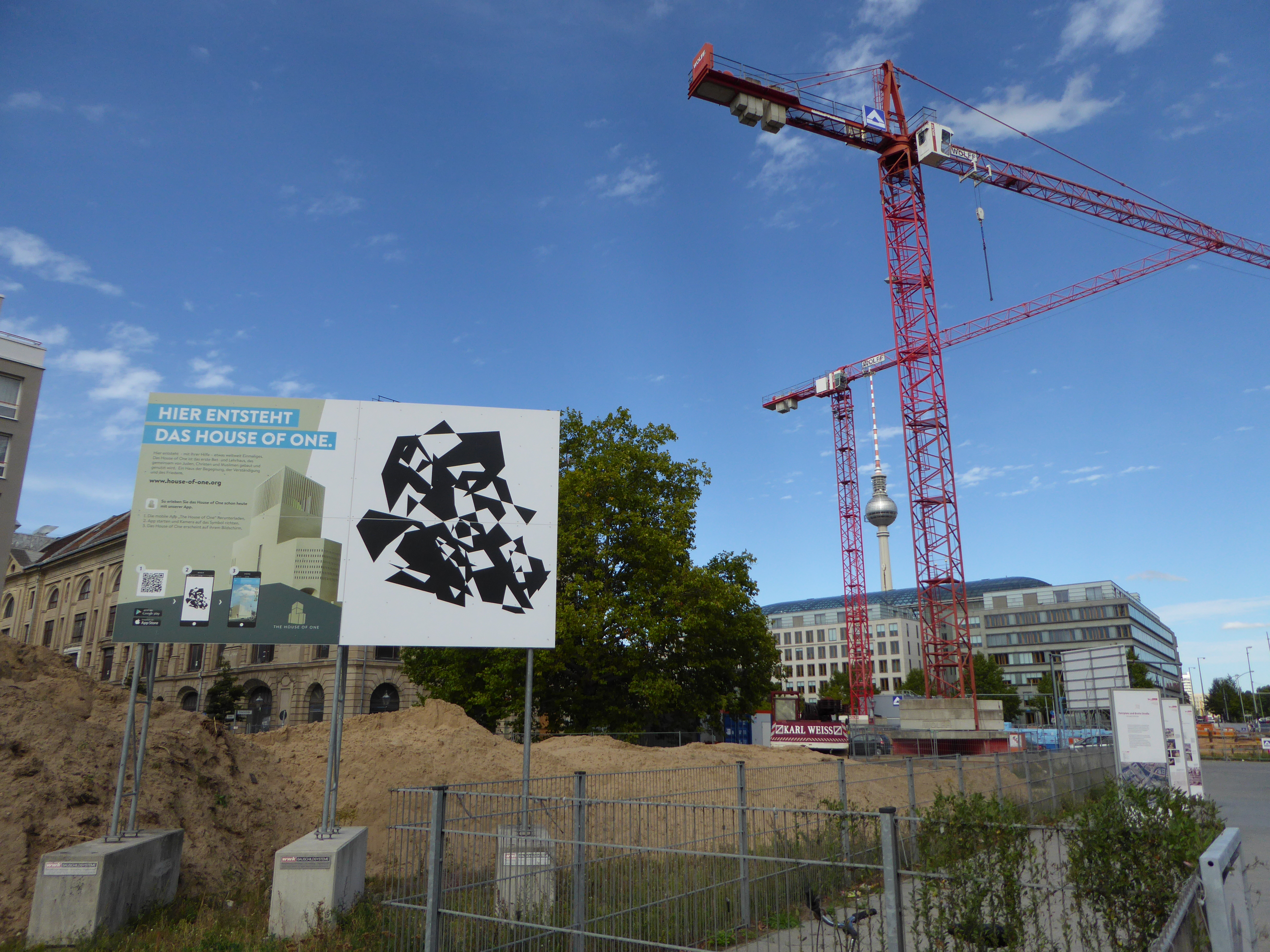 Berlin-Mitte, Petriplatz an der Gertraudenstraße, The House of One, geplantes multireligiöse Bet- und Lehrhaus Sankt Petri (St. Petri: Moschee, Synagoge, Kirche und Begegnungszentrum unter einem Dach)